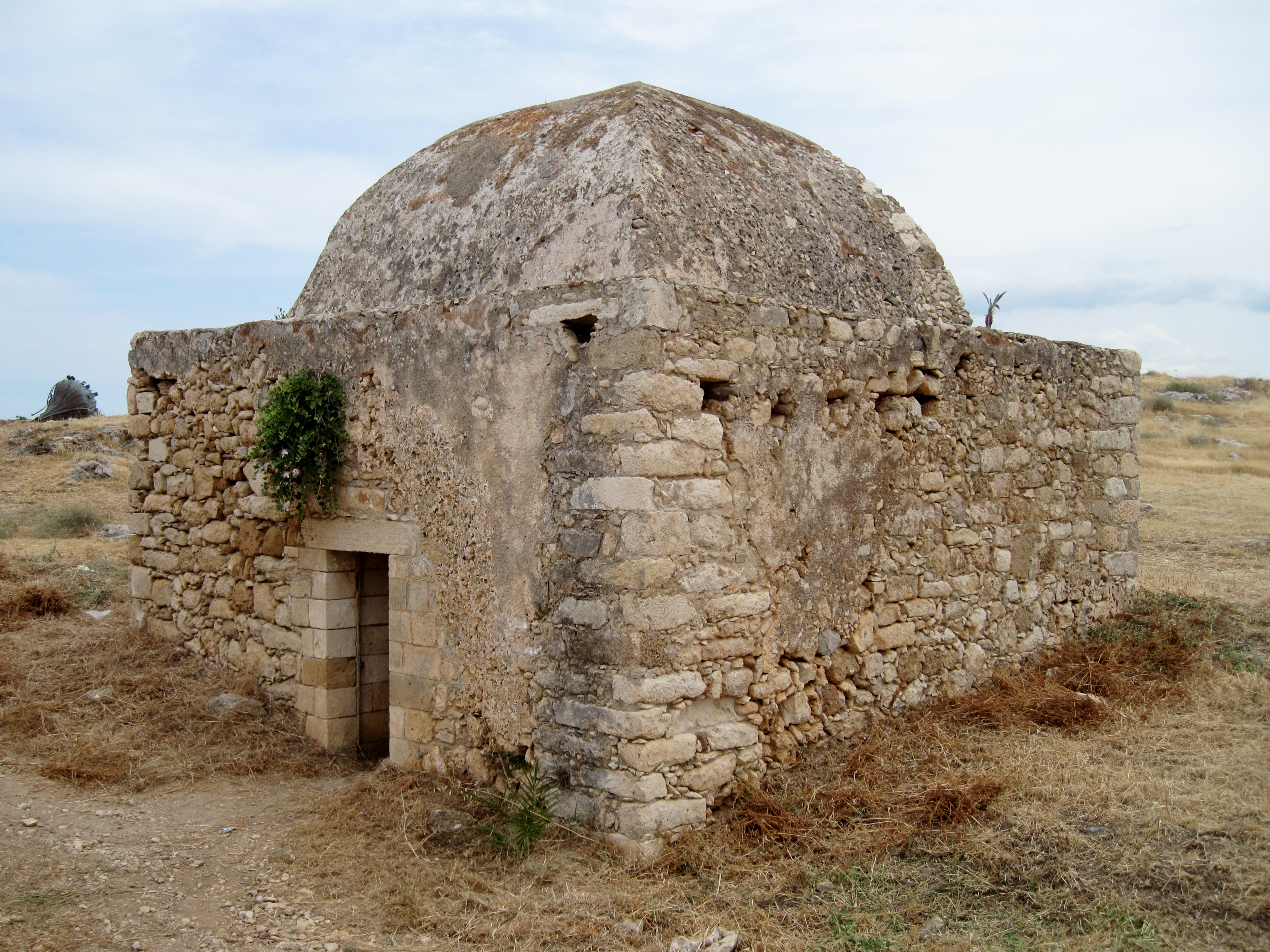 Gebäude an der Westseite der Fortezza von Rethymno (Φορτέτζα του Ρεθύμνου), Festungsanlage innerhalb der Stadt Rethymno, Regionalbezirk Rethymno, Kreta, Griechenland